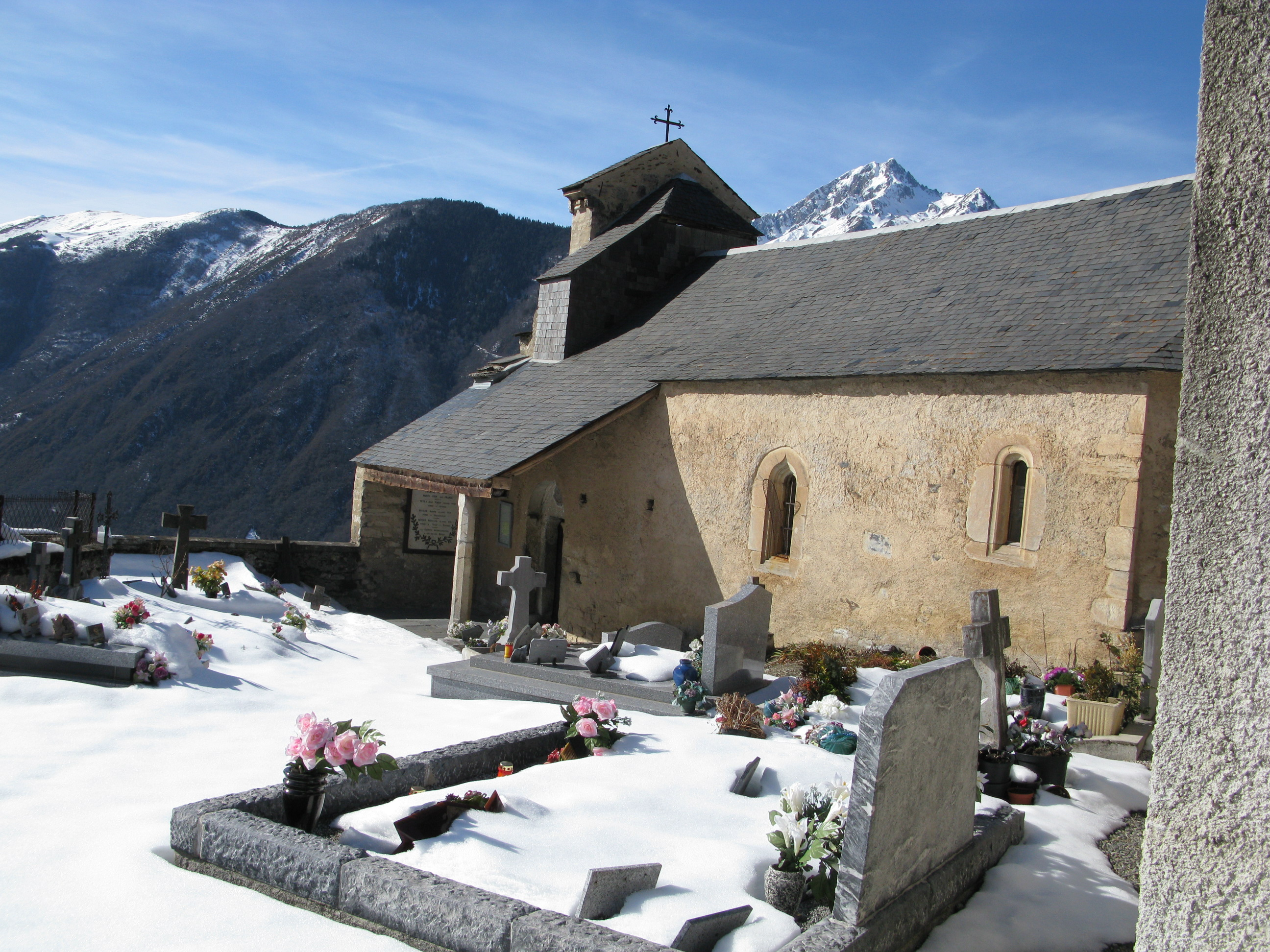 Le cimetière et l'église de Grailhen